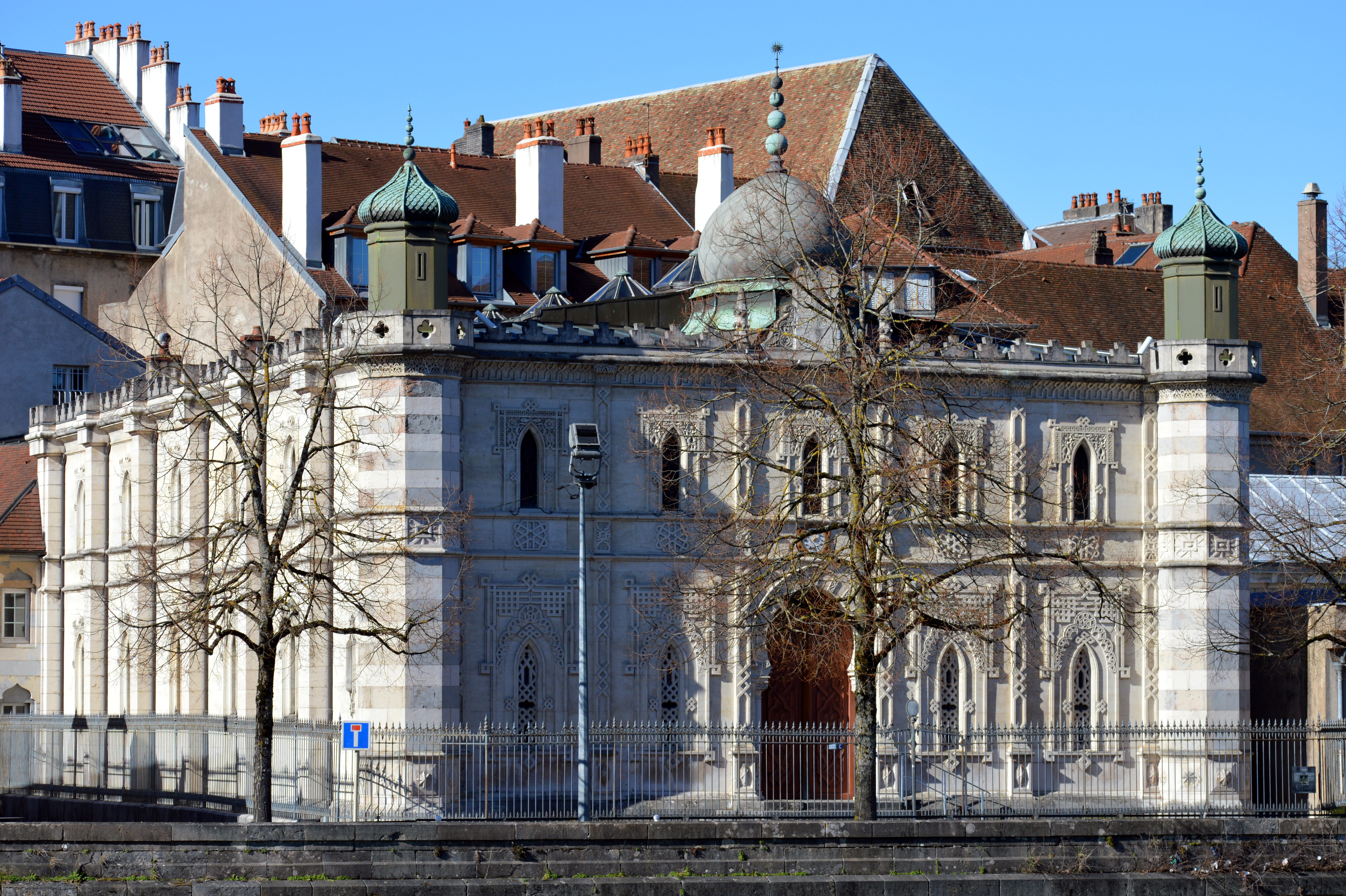 La synagogue de Besançon depuis le quai Vauban.